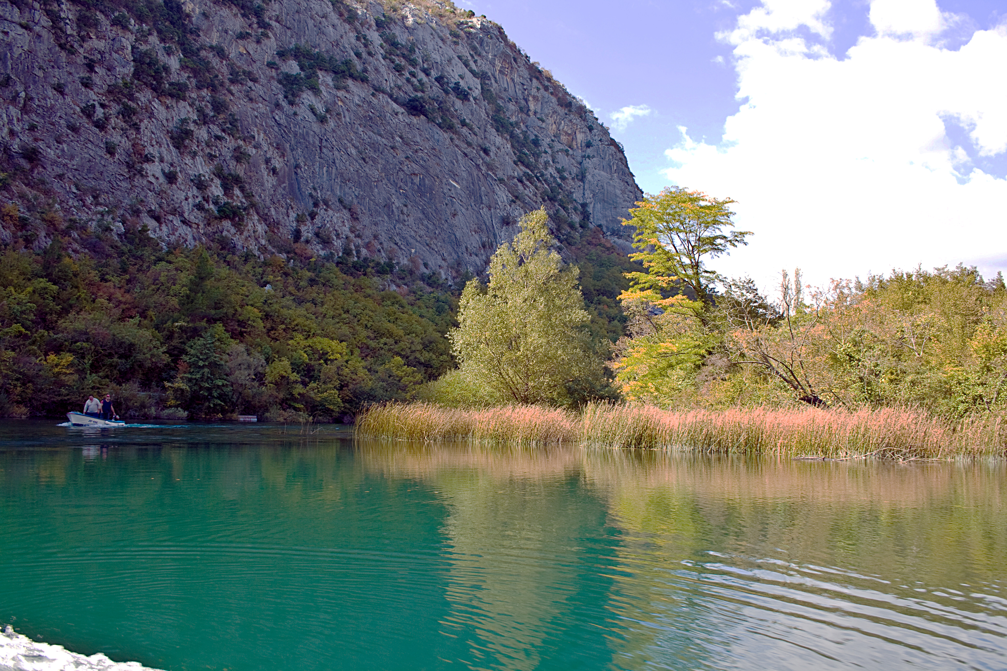 Auf_der_Cetina_nach_Omis